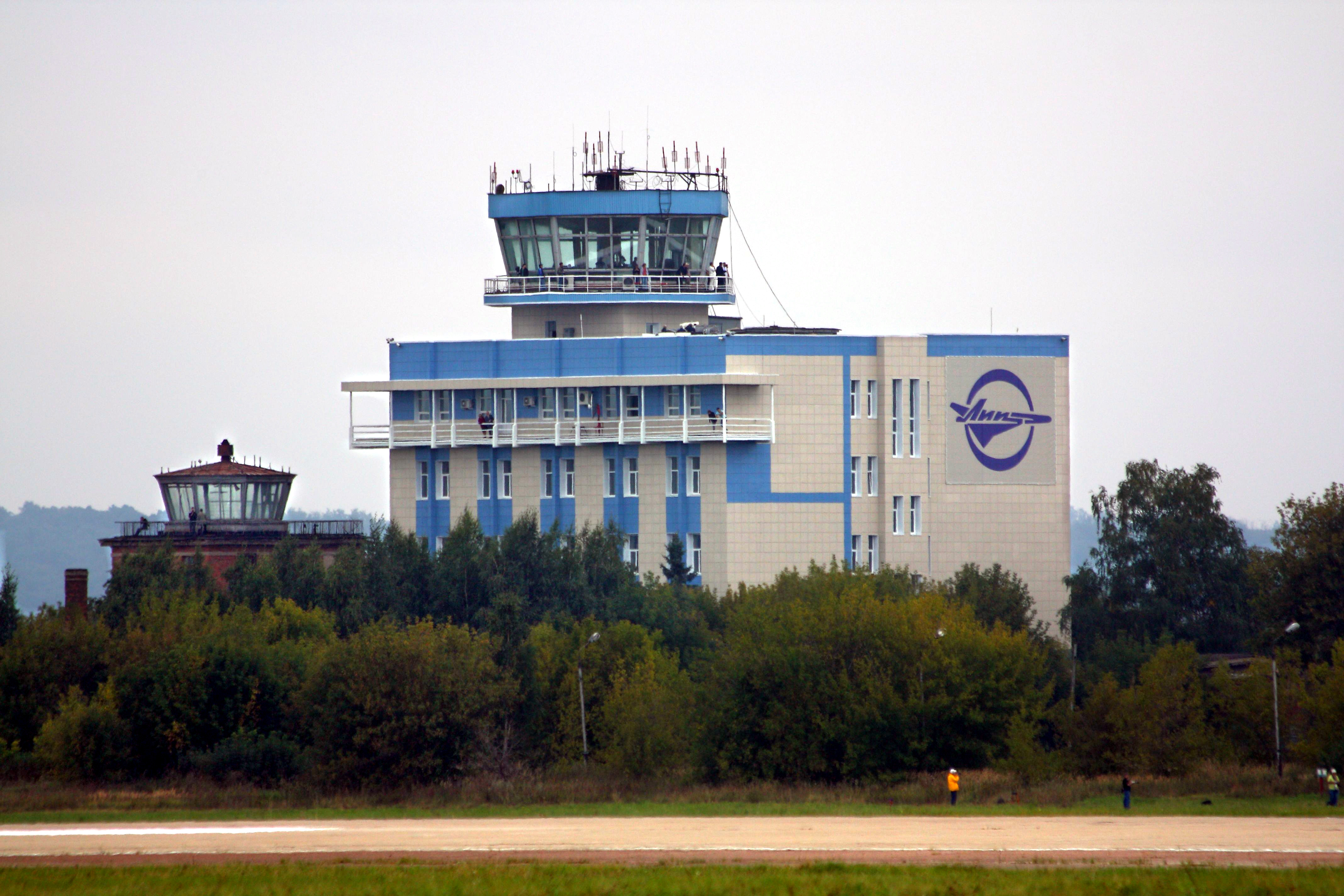 Командно-диспетчерский пункт основной взлётно-посадочная полосы ЛИИ им. Громова (Международный авиакосмический салон МАКС-2013)